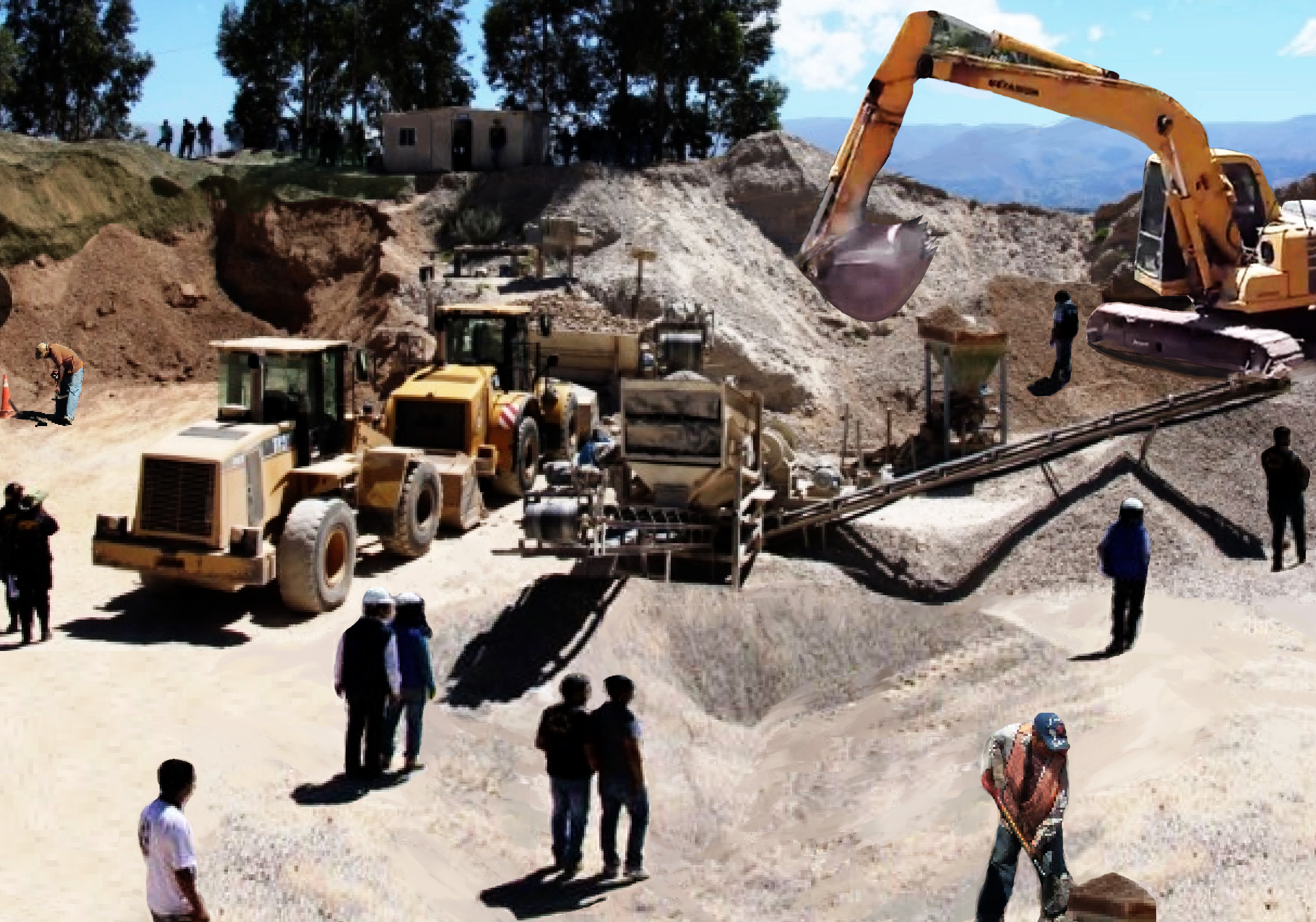 Sociedad Nacional de Minería, Petróleo y Energía (año 2008).